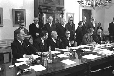 Kabinet-Zijlstra